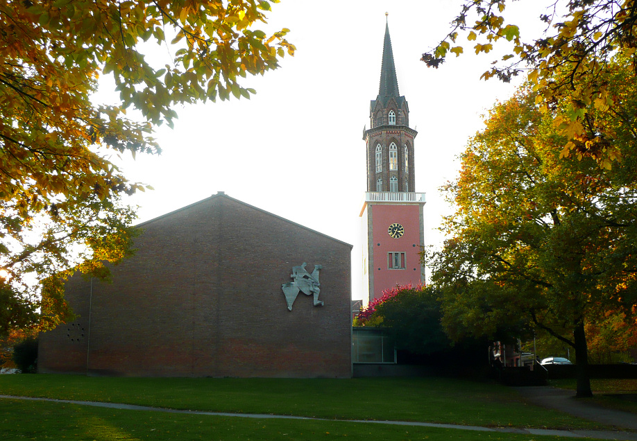 Ansicht St. Martin (Hannover-Linden)